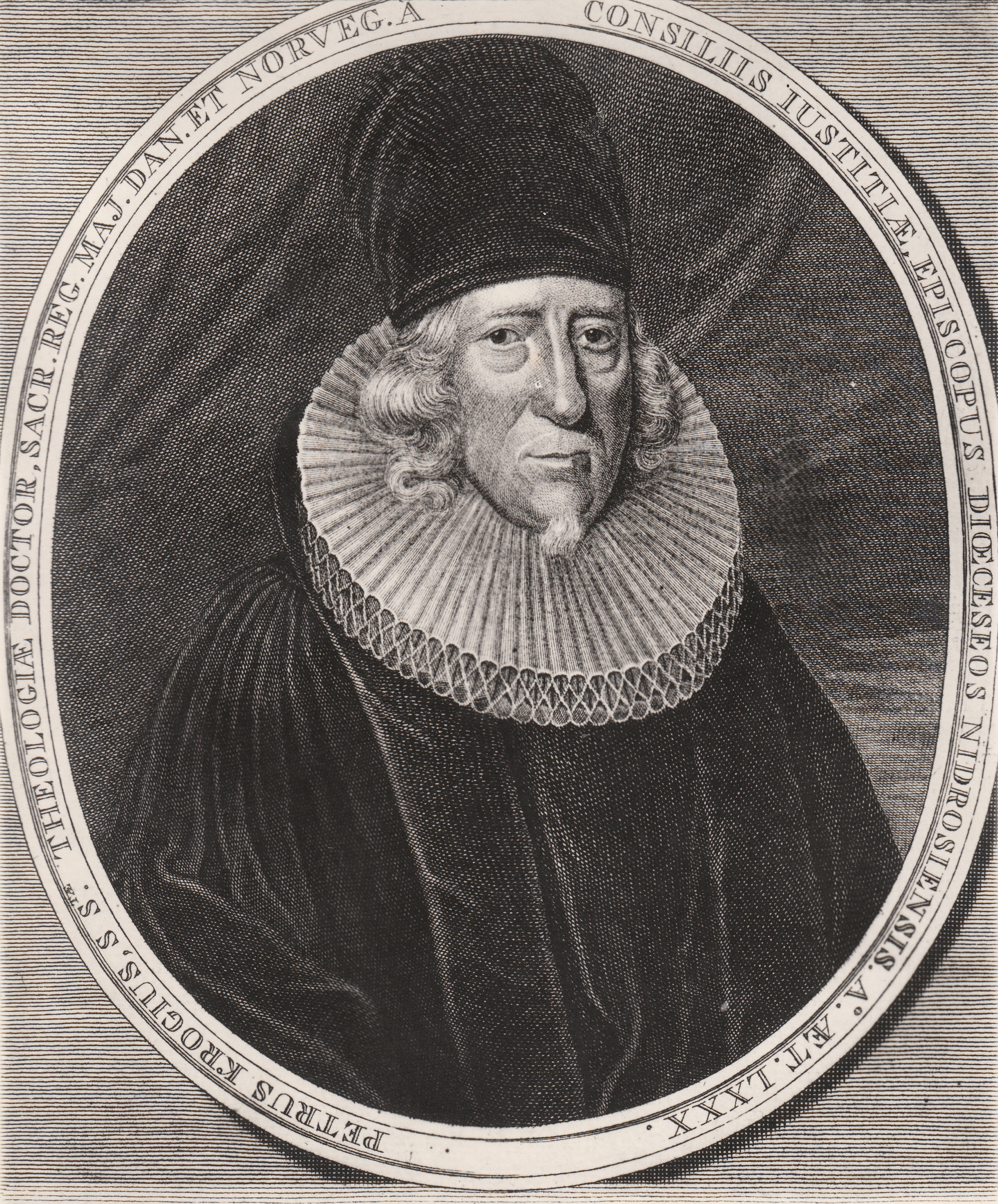 Format: Fotopositiv (avfotografert stikk) Dato / Date: Antagelig 1897 Kunstner / Artist: Ukjent Fotograf / Photographer: Antagelig Erik Olsen (1835 - 1920) Sted / Place: Trondheim Wikipedia: Peder Krog (1654 - 1731) Store Norske Leksikon: Peder Krog (1654 - 1731) Eier / Owner Institution: Trondheim byarkiv, The Municipal Archives of Trondheim Arkivreferanse / Archive reference: Tor.H41.B40.F2950 Peder Krog, født 8. april 1654, fødested Århus, Danmark, død 24. mai 1731, dødssted Trondheim, Sør-Trøndelag. Biskop.